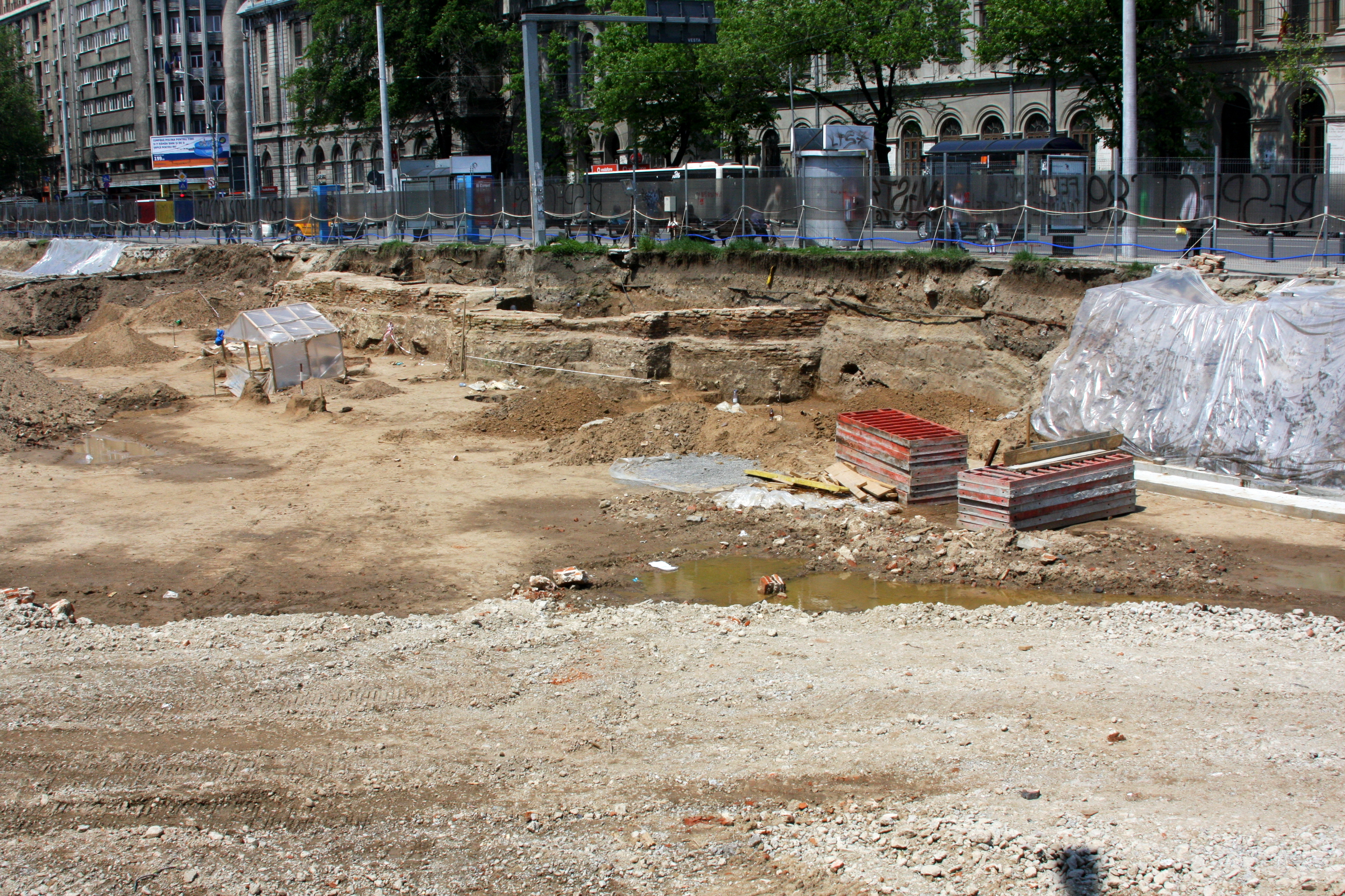 Universitatea Bucuresti 01